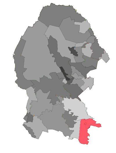 Distrito 4 Federal en Coahuila